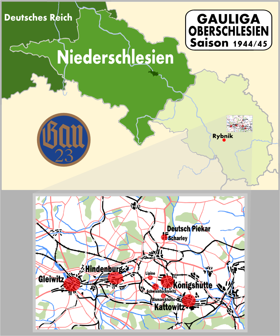 Spielorte der Gauliga Oberschlesien 1944/45.